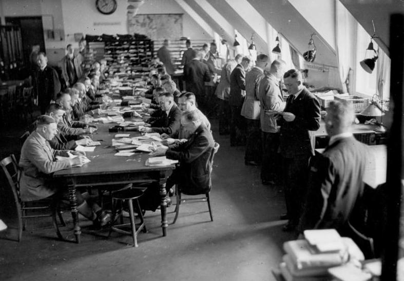 EIS 301104 Ein Blick hinter die Schalter der Grossbank. Gewöhnlich hat der Kunde der Bank nur am Schalter zu tun und sieht nicht, was dahinter vorgeht und was für eine Riesenorganisation hinter einer modernen Grossbank steht. Unsere Bilderserie gibt einen Einblick in den Alltagsbetrieb eines solchen Institutes und veranschaulicht die weitgehende Mechanisierung und Rationalisierung, die heutzutage nötig ist, um den Betrieb rentabel zu gestalten. Die Bilder sind in den Räumen der Deutschen Bank und Disconto-Gesellschaft, Berlin, aufgenommen. (Zentrale). P & A Bild zeigt: Jeden Morgen kommen etwa 28.000 Postsendungen an (45.000 etwa werden jeden Tag abgeschickt), die früh geöffnet und nach einem System in die einzelnen Abteilungen weitergeleitet werden.